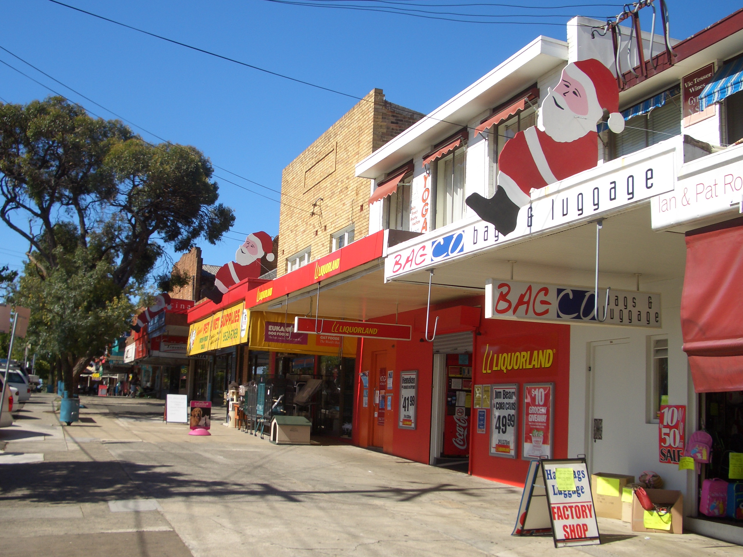 Gymea